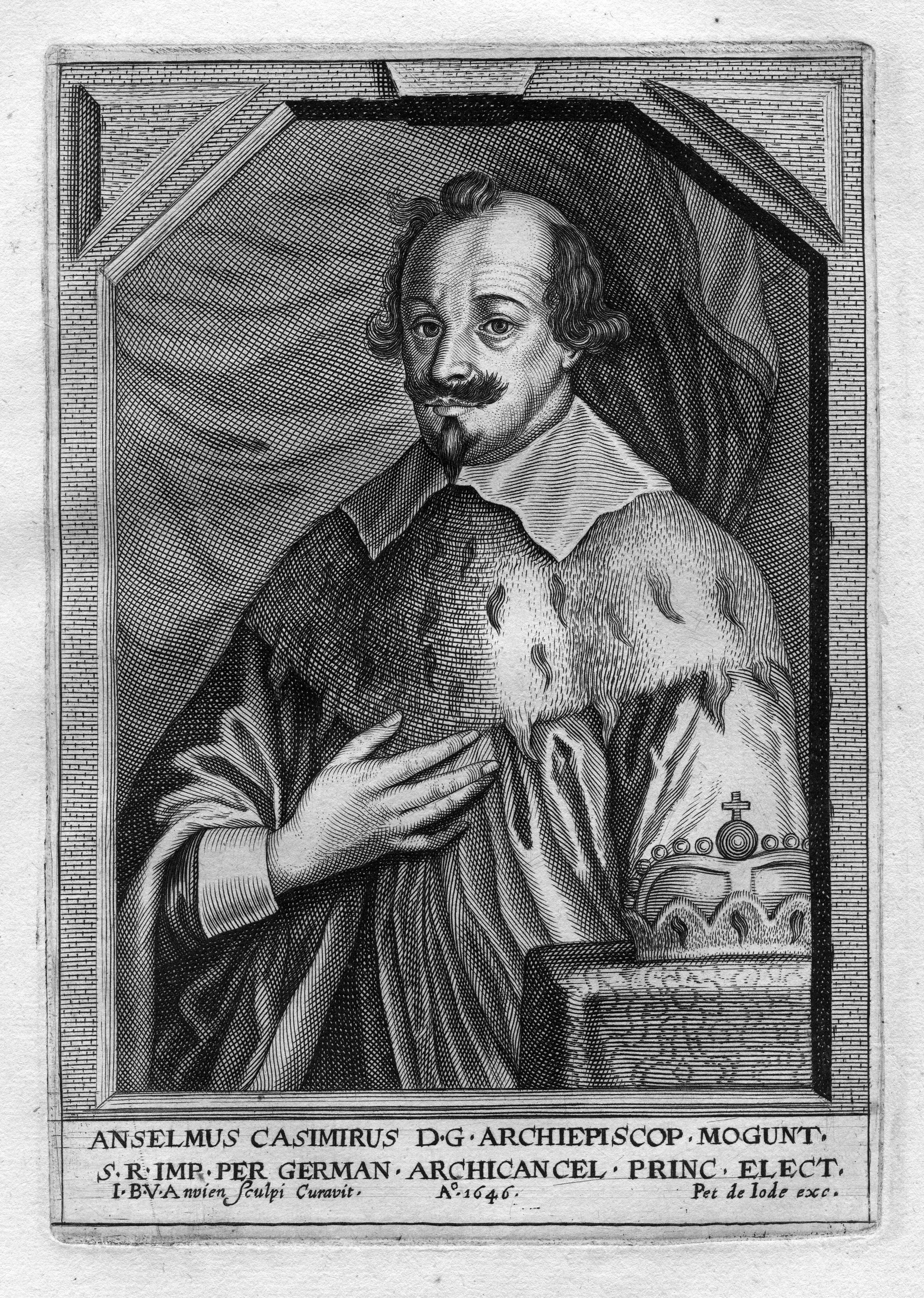 portrait gravé